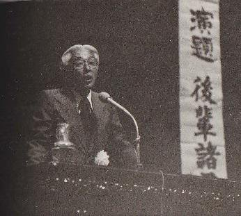 1977年10月14日 名古屋市鶴舞公会堂 愛知一中・旭丘高校 創立100年祭 記念講演会 SONY's CEO Akio Morita at age of 57's Speech at Tsurumai municipal hall in October 14 1977